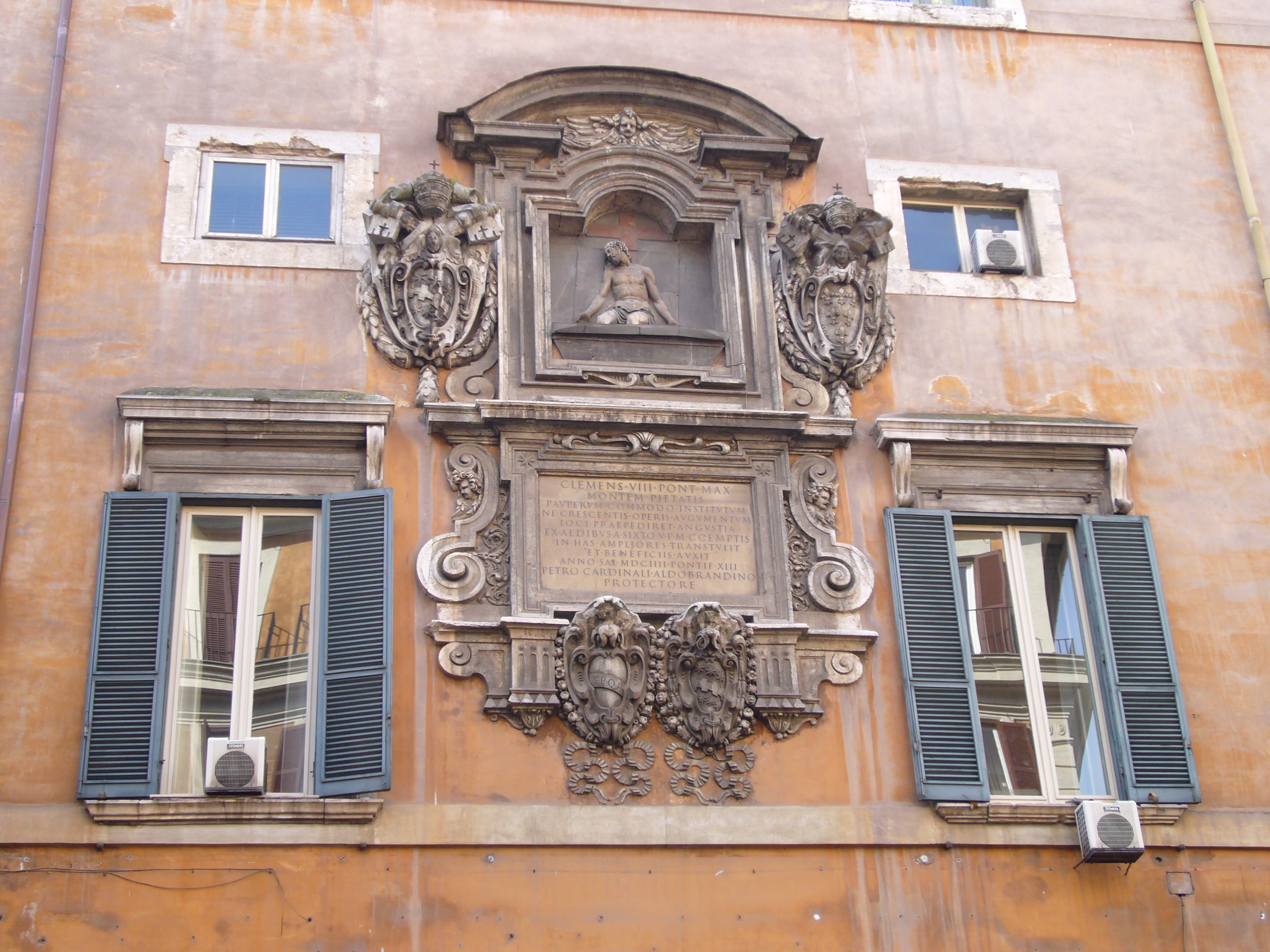 Roma, palazzo del Monte di Pietà: lapide dedicatoria con stemmi dei papi che lo stabilirono (Clemente VIII Aldobrandini (a sinistra) e Paolo III Farnese (a destra)) e Cristo in Pietà (1604)